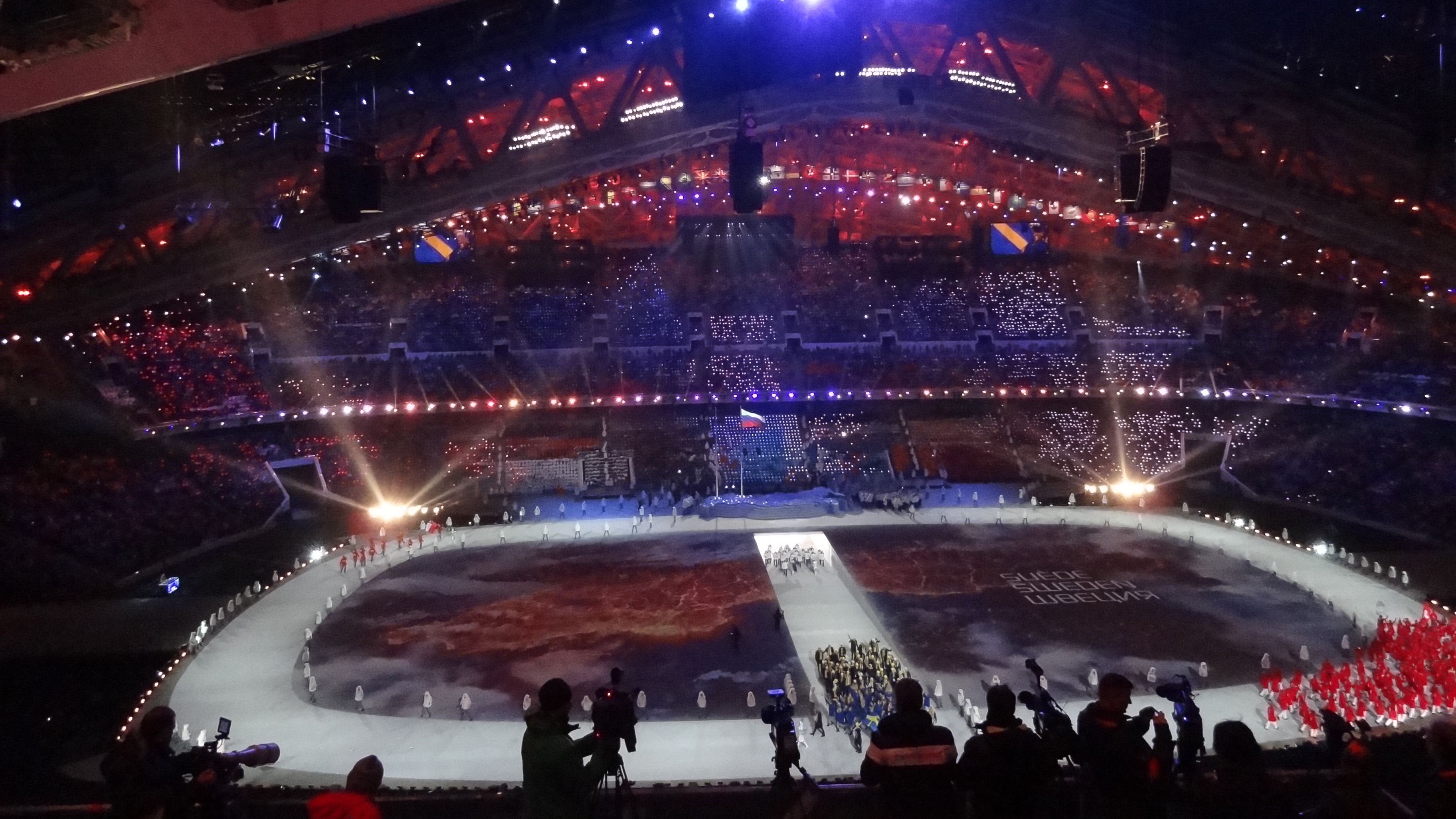 Церемония открытия Олимпийских игр в Сочи. Сборная России. 7 февраля 2014 года.